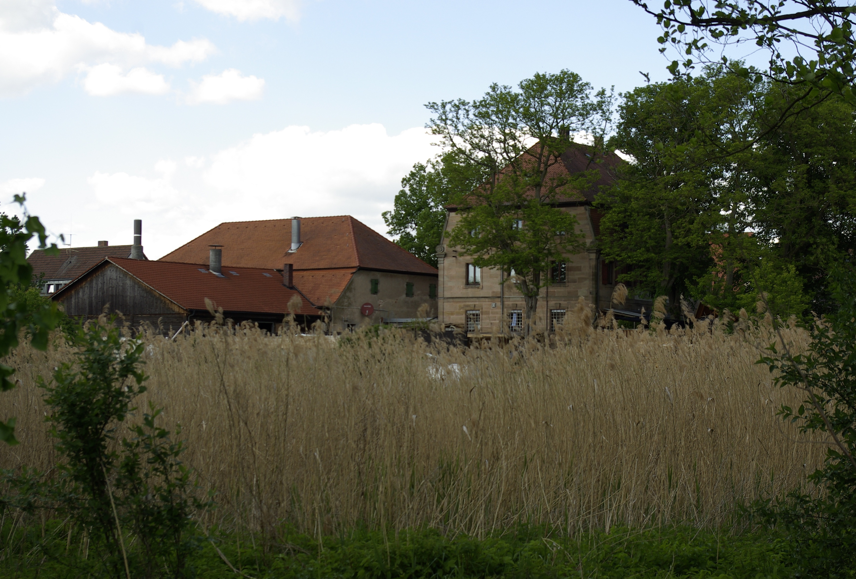 Ehemaliges Schloss im Erlanger Stadtteil Tennenlohe. 1777 bis 1782 durch den Nürnberger Patrizier Jakob Gottlieb Rudolf von Volckamer errichtet und bis 1826 in Besitz der Familie. Seit 1835 Eigentum der Familie Klein. Seit 1860 Gaststätte. Vorgängerbauten seit dem 14. Jahrhundert.